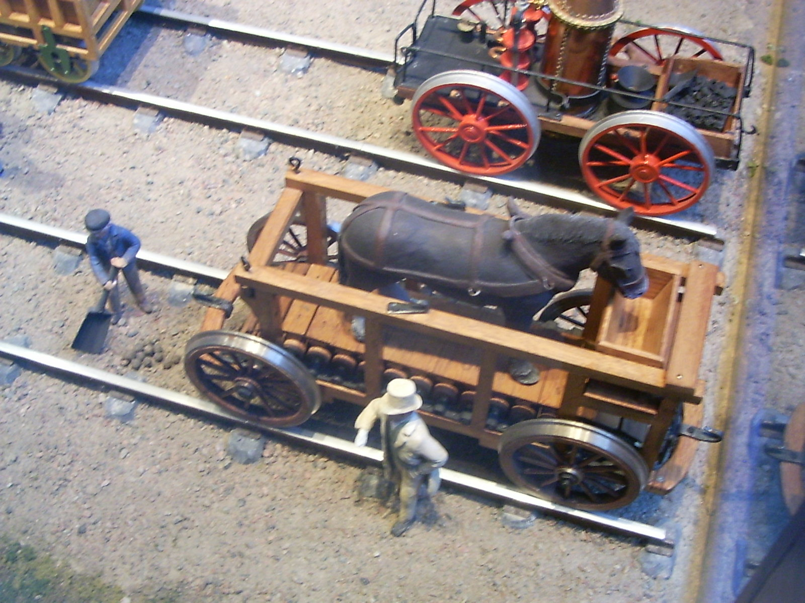 Järnvägens museum Ängelholm. Ängelholm, Ängelholm Cycloped